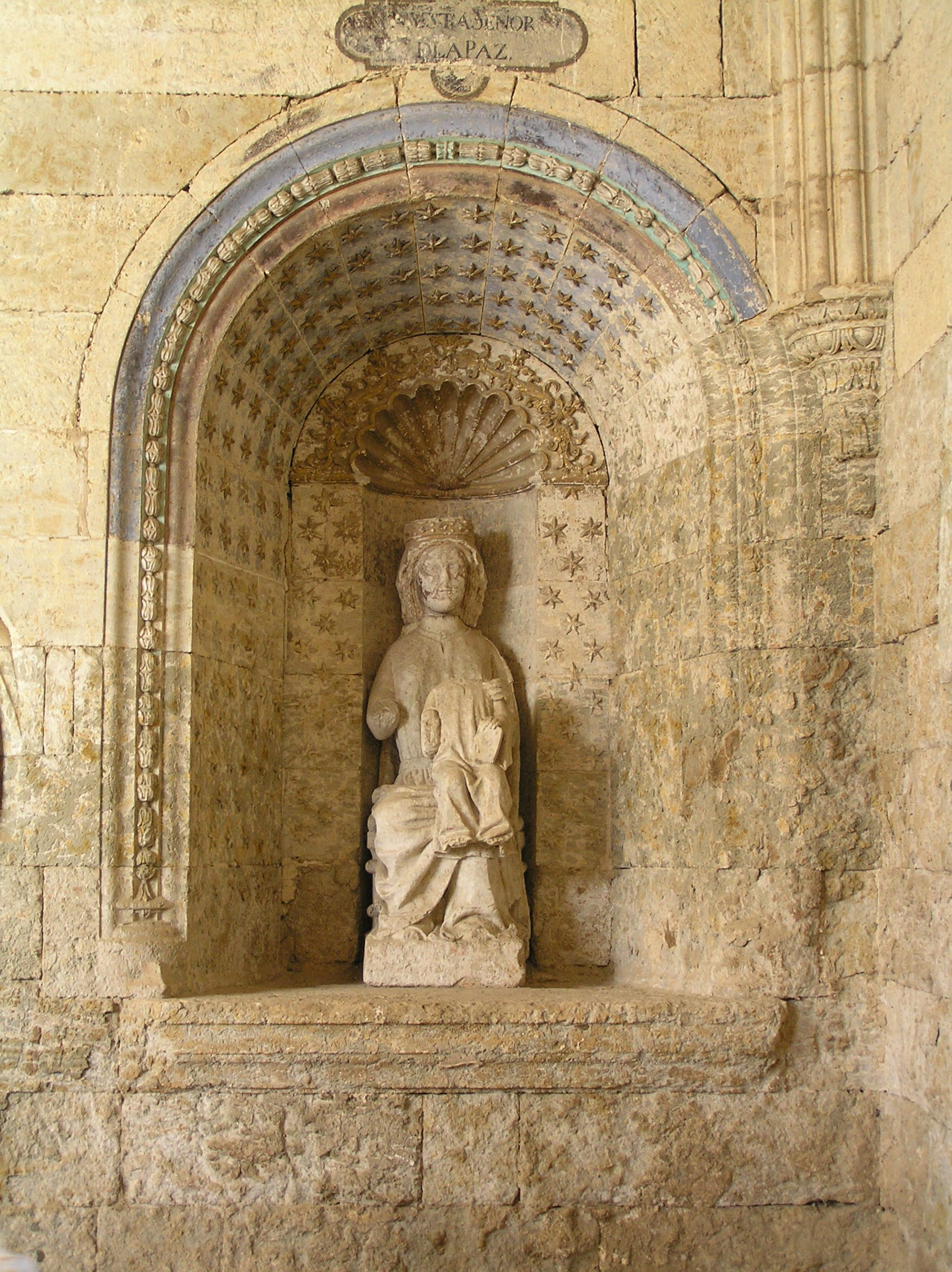 Nuestra Señora de la Paz (siglo XIII), en el claustro de la Catedral de Ciudad Rodrigo. Ciudad Rodrigo (provincia de Salamanca, España)